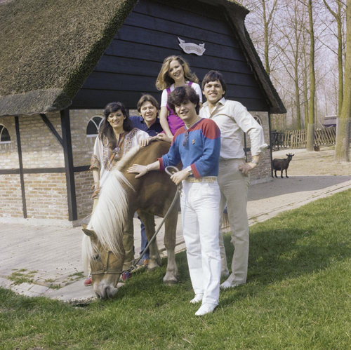 De Oostenrijkse groep Blue Danube tijdens een fotosessie voor het Eurovisie Songfestival 1980